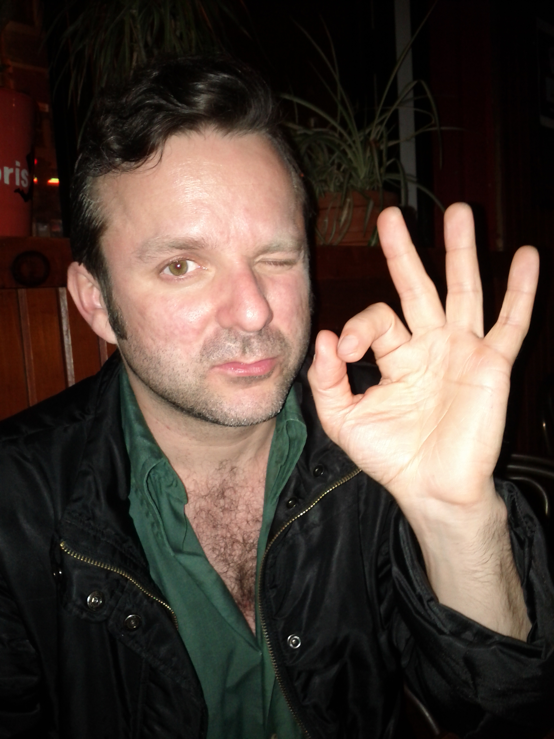 Sunny Duval